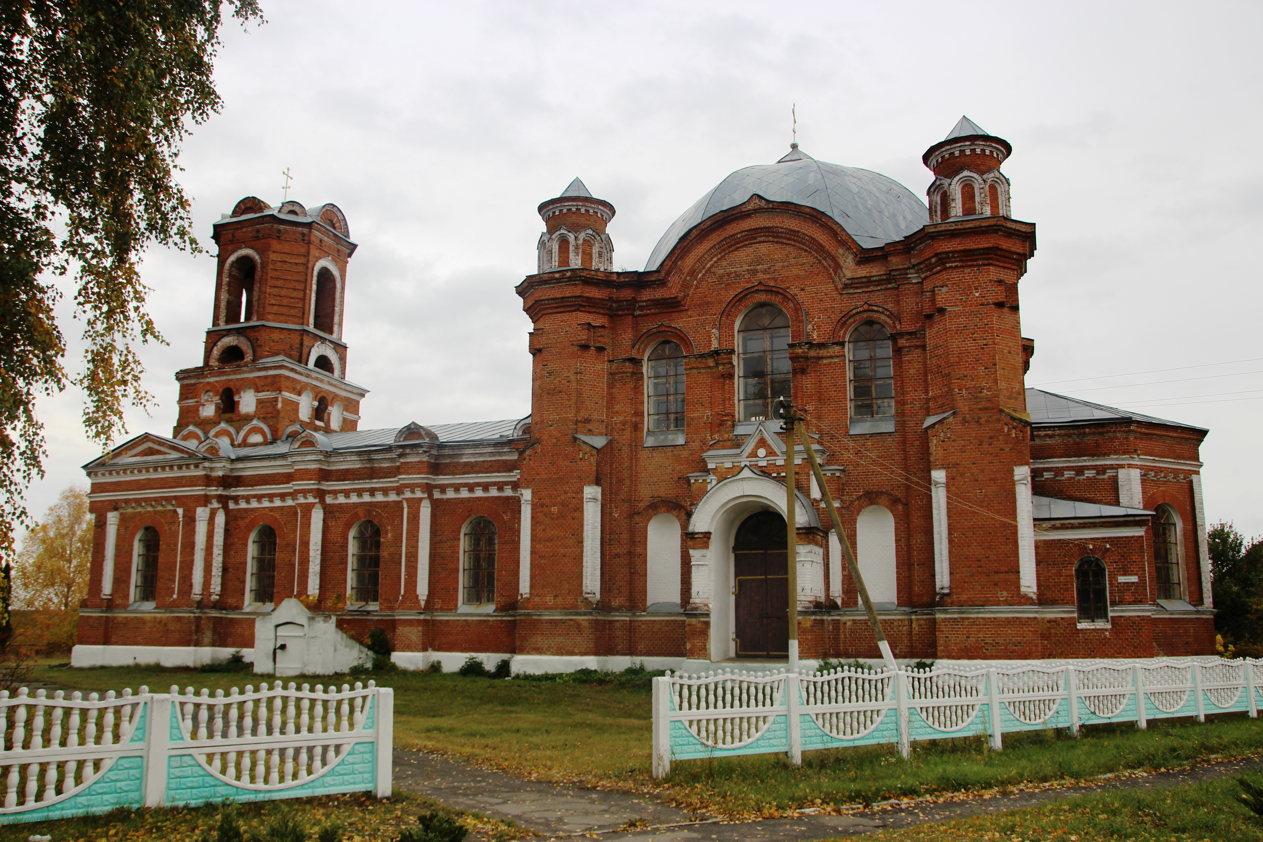 Церква св. Параскеви (мур.), село Великий Вистороп, вул. Бережна, 17б